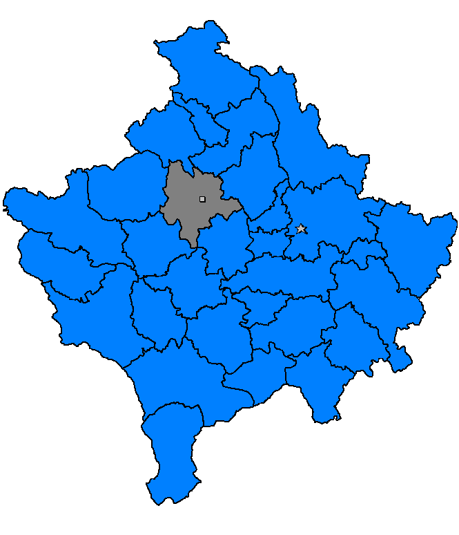 Skenderaj, Kosovë 2006